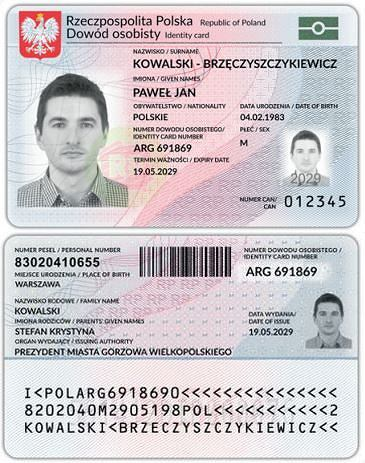 Dowód osobisty wydawany od 4 marca 2019 roku, zawierający warstwę elektroniczną